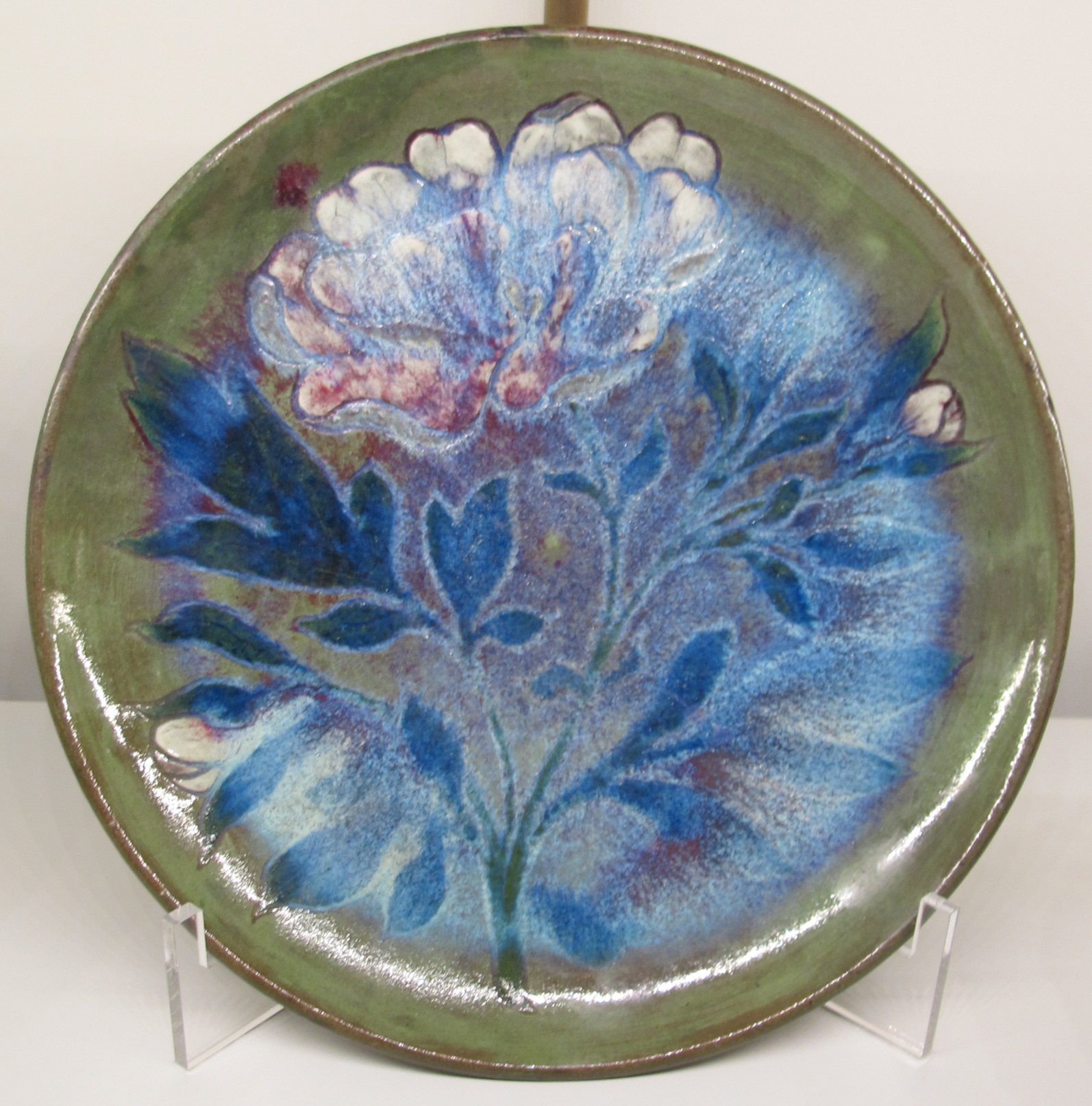 Auguste delaherche, piatto, parigi 1894 ca.